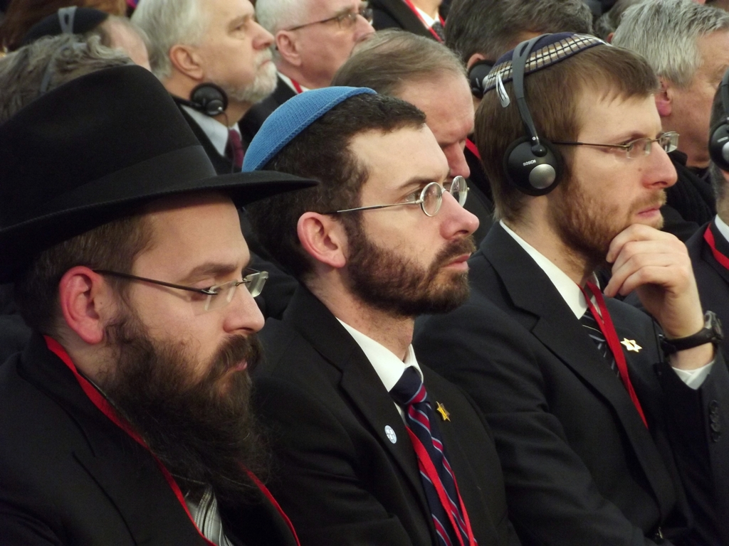 Zdjęcie zrobione podczas 69. rocznicy wyzwolenia KL Auschwitz-Birkenau.